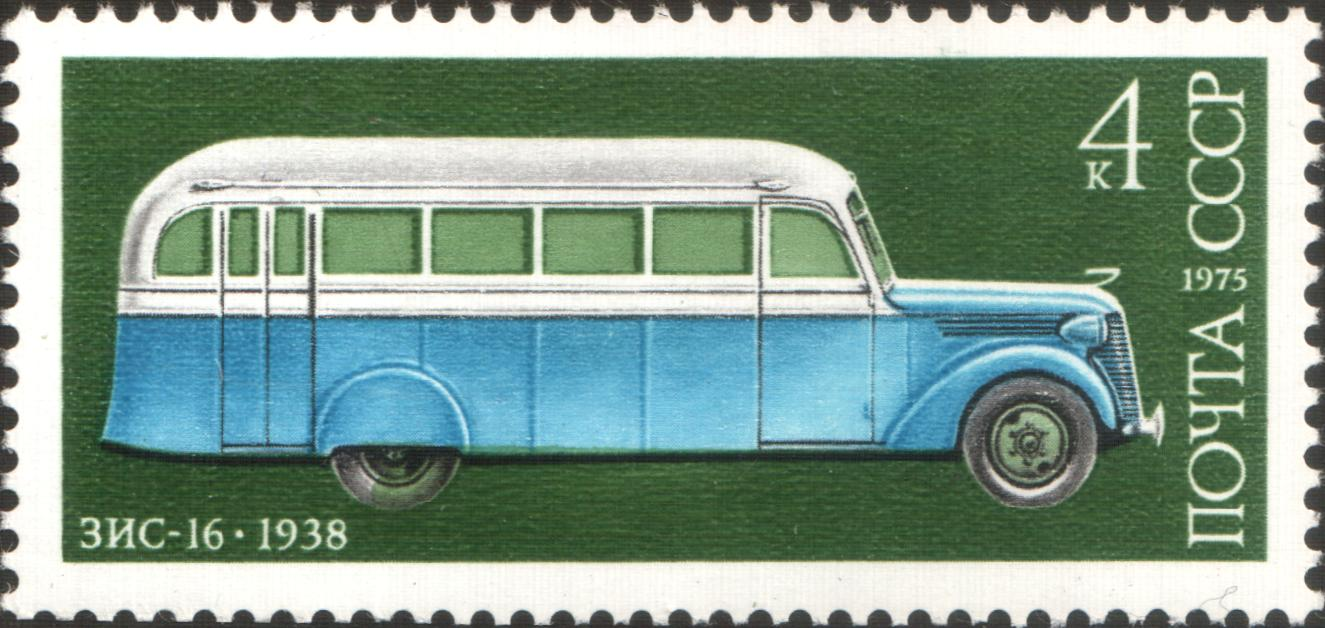 Почтовая марка СССР. 1975. Зис-16